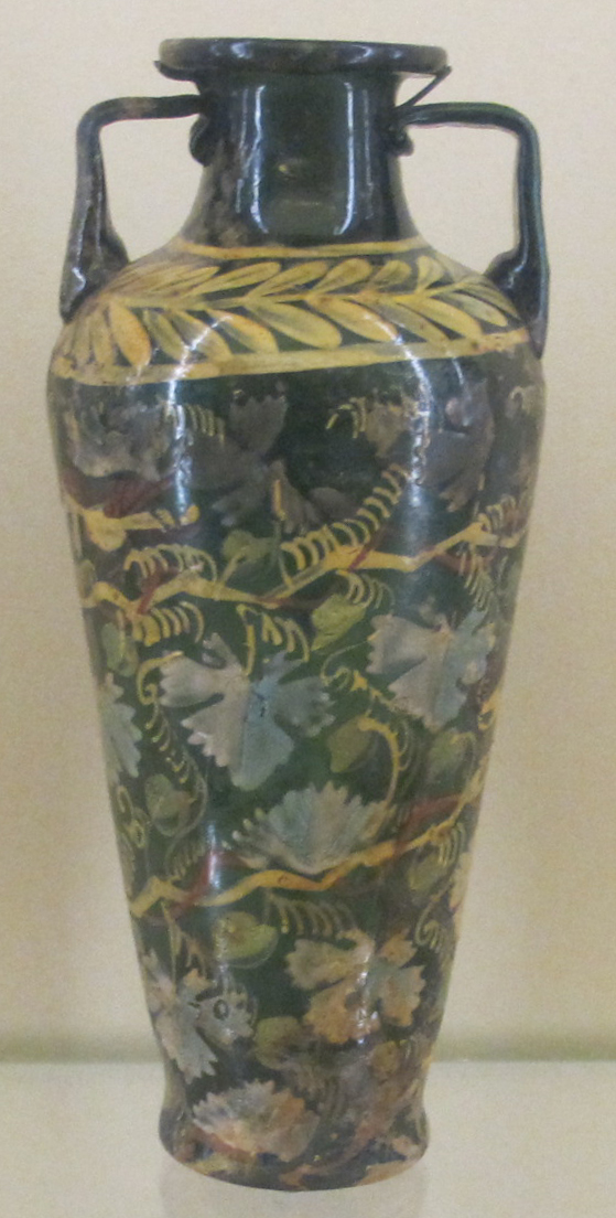 Anfora dipinta con uccelli su tralci, alessandria o italia, I sec. dc.